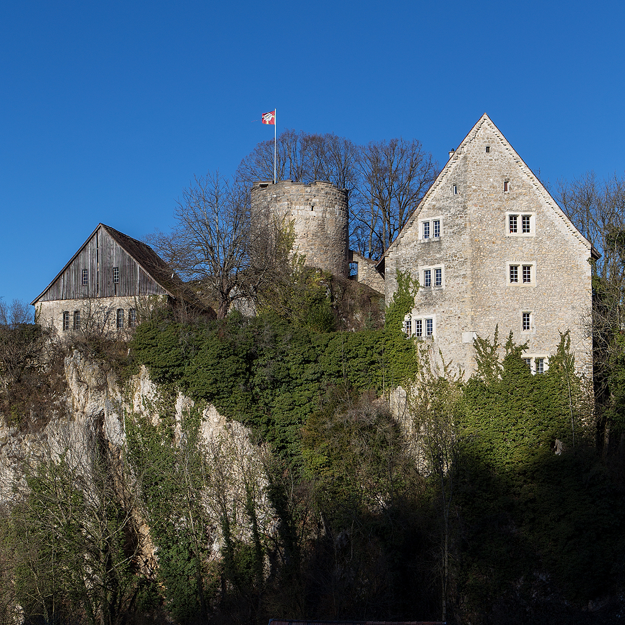 Château de Pleujouse (JU)